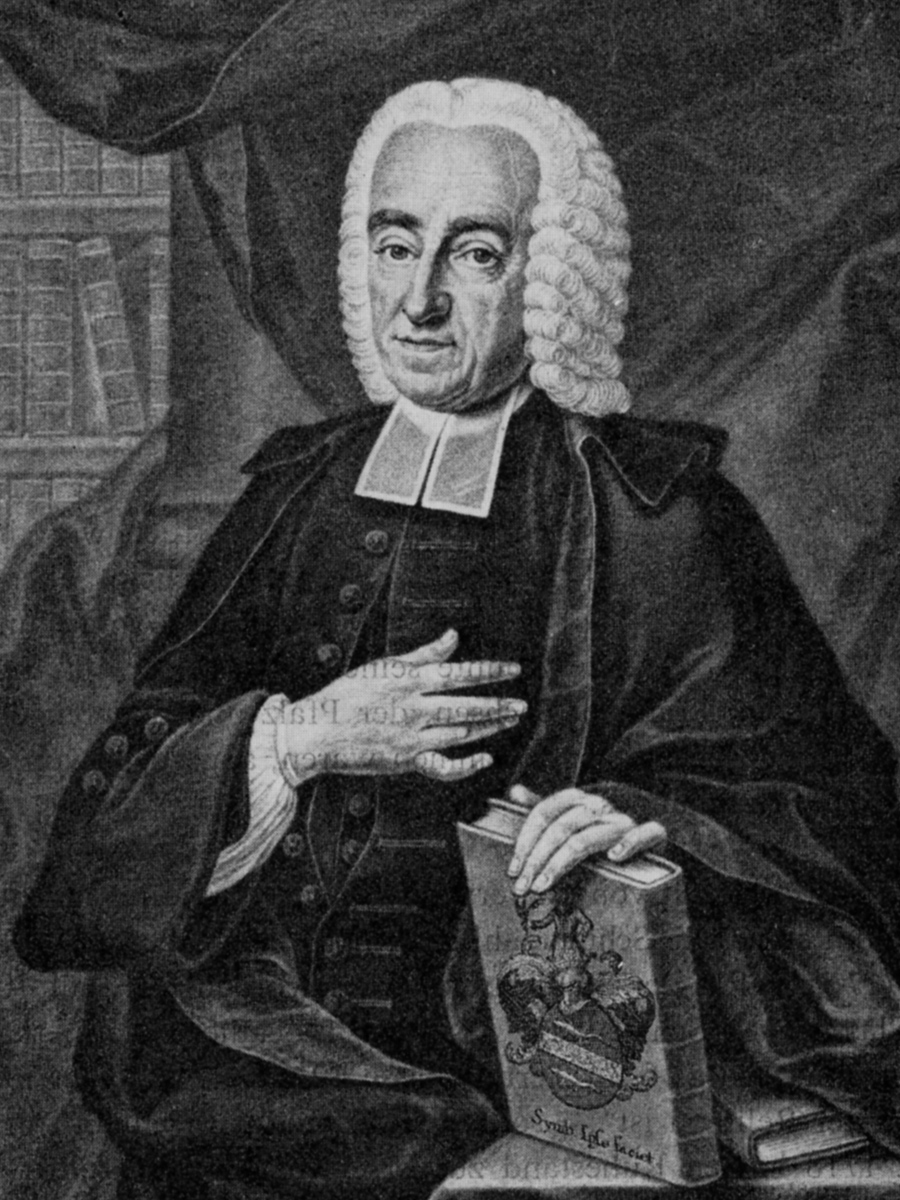 Gottfried Hecking, Rektor des Heilbronner Gymnasiums 1718 bis 1743